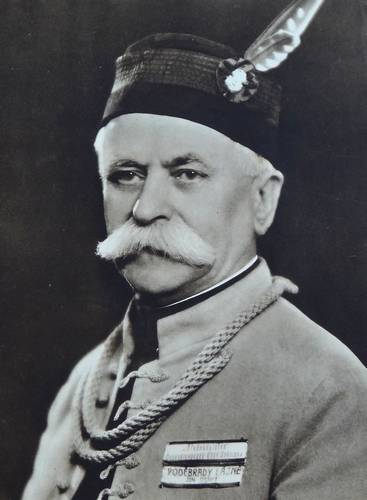 Josef Truhlář (1870-1957), český soudce a sokolský činovník